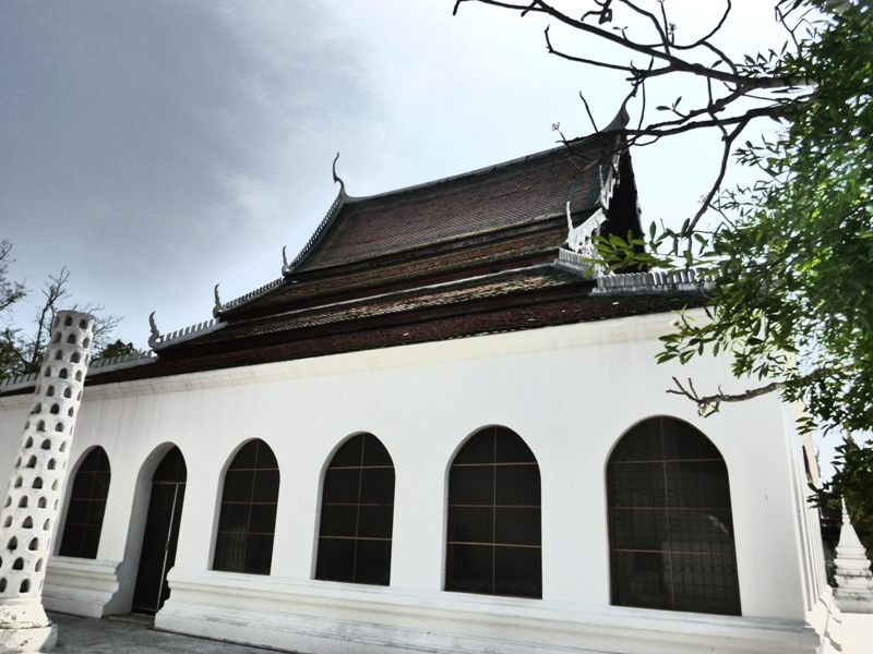 พระแท่นดงรัง